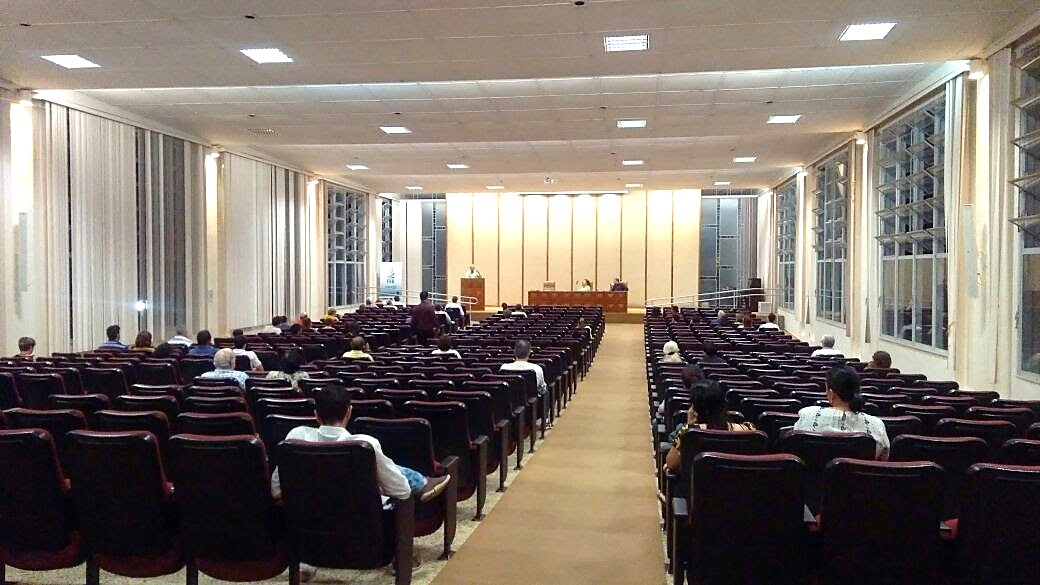 Salono interne de la sidejo de Brazila Spiritisma Federacio en Braziljo, Brazilo